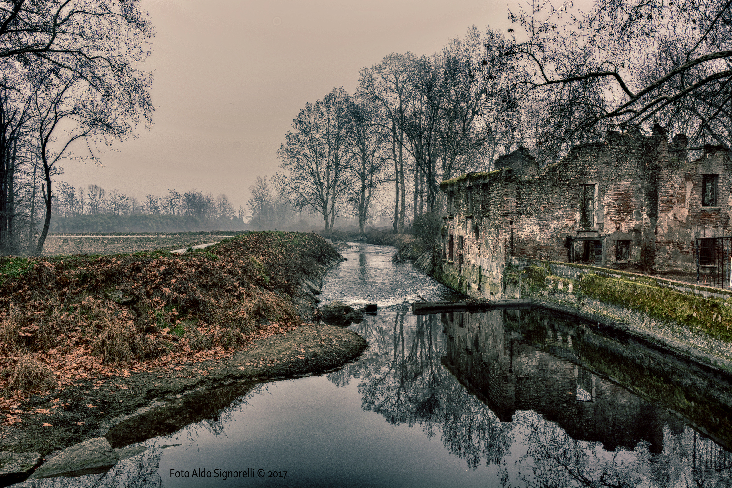 Q29886088 This is a photo of a monument which is part of cultural heritage of Italy.